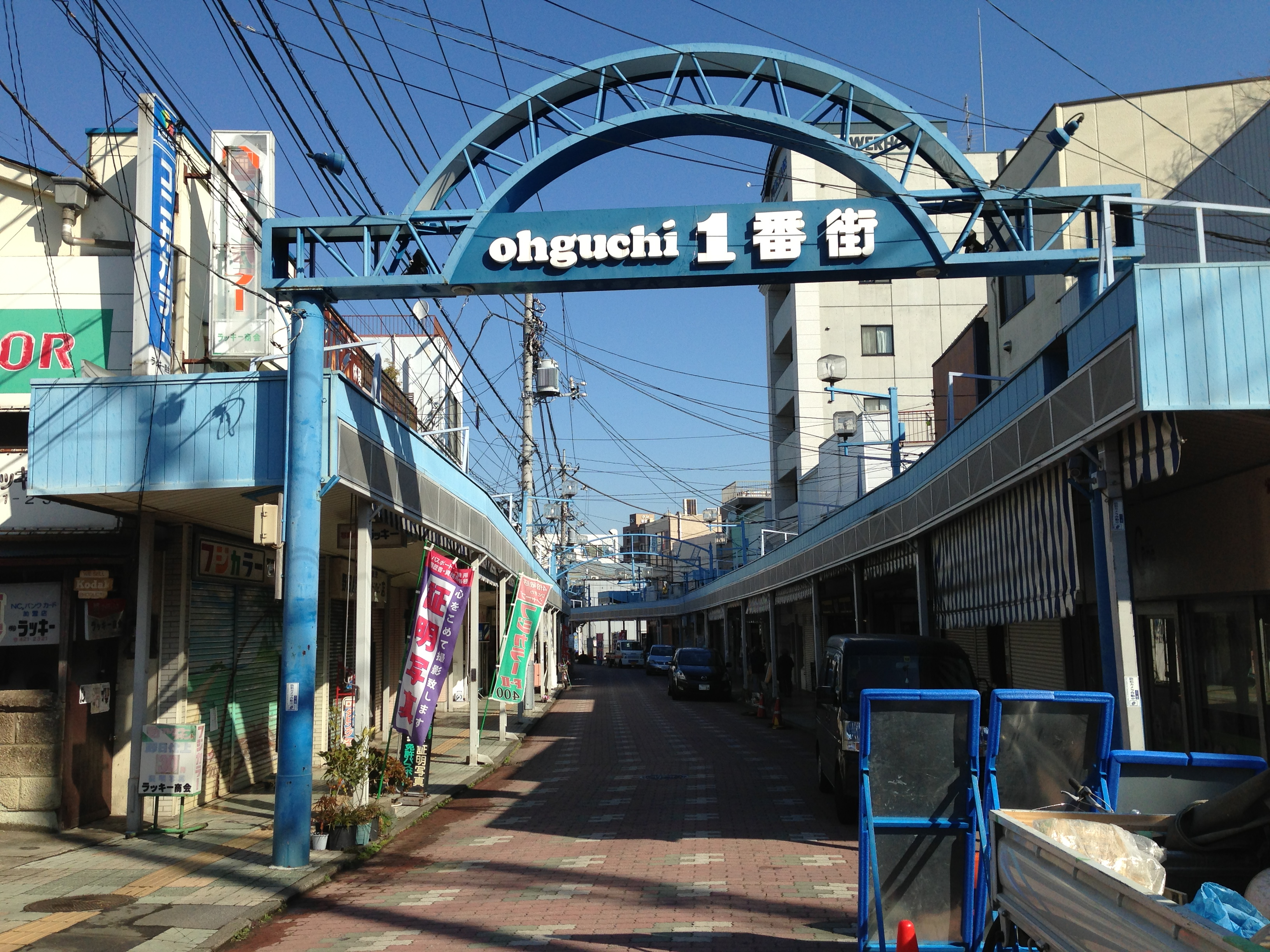 神奈川県横浜市神奈川区大口通